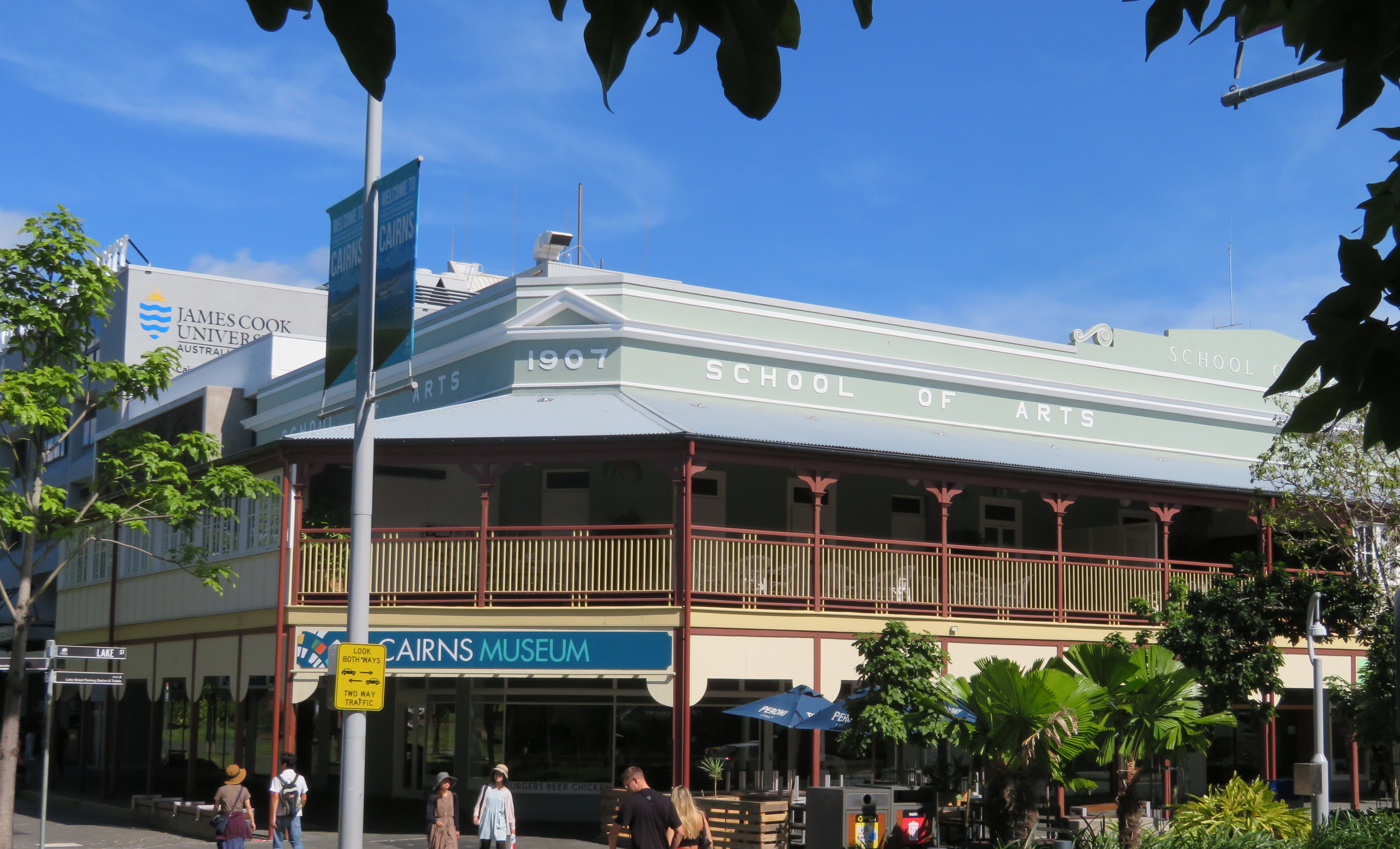 Museum in Cairns, Queensland, Australien